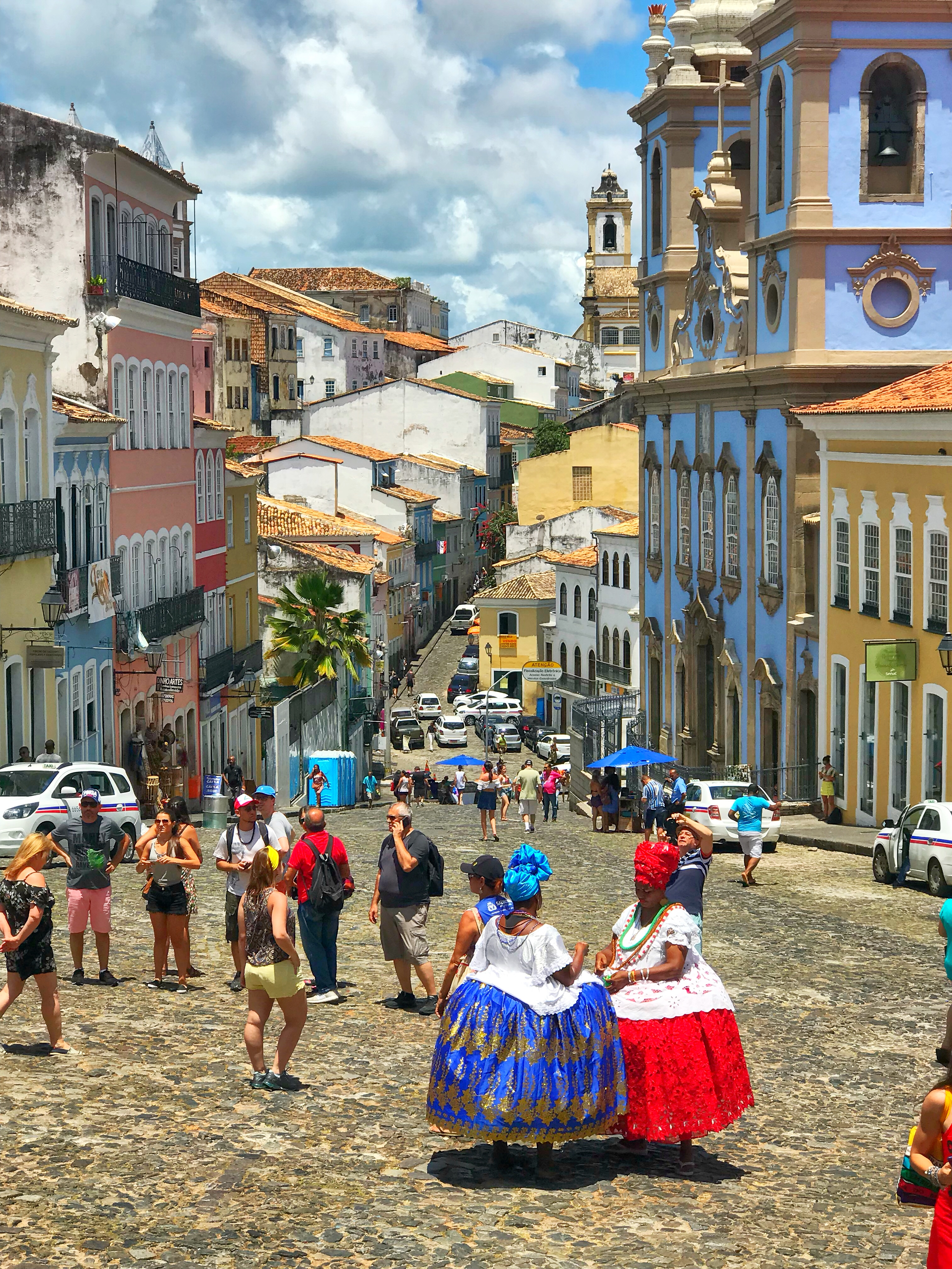 Bem tombado pelo Instituto do Patrimônio Artístico e Cultural da Bahia na cidade de Salvador Cultural property Historic Centre of Salvador de Bahia, Cidade Alta, Salvador, Bahia, Northeast Region, Brazil Q5572706, VIAF ID: 149096237, Library of Congress authority ID: n97021267, P727:, World Heritage Site ID: 309